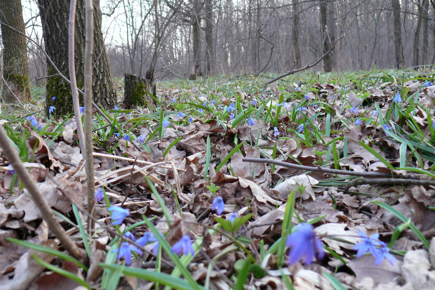 Первые цветы Харьковщины